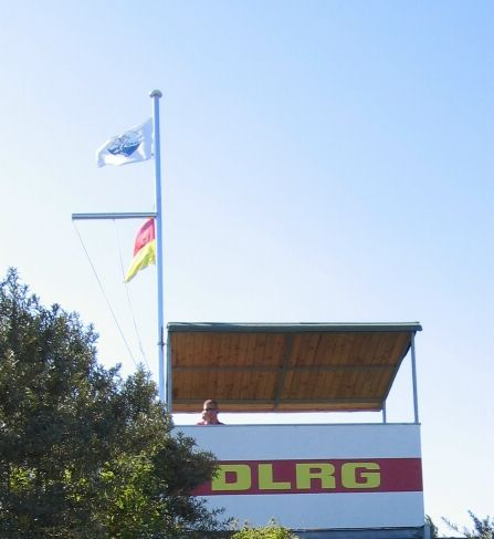 DLRG-Wachturm mit gehisster Flagge (rot-gelb=Wasserrettung im Einsatz), Benjamin Schaefer